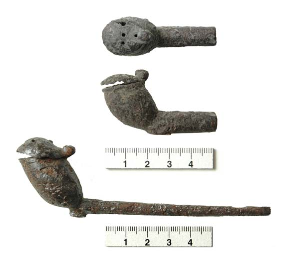 Eiserne Tabakpfeifen, Bodenfunde aus der Schweiz, typologische Datierung etwa 1660/1680 bis 1740/1750; die Maßangaben sind (mutmaßlich) in Zentimeter